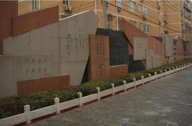 十一学校将帅语林碑，用于条目编辑，自拍